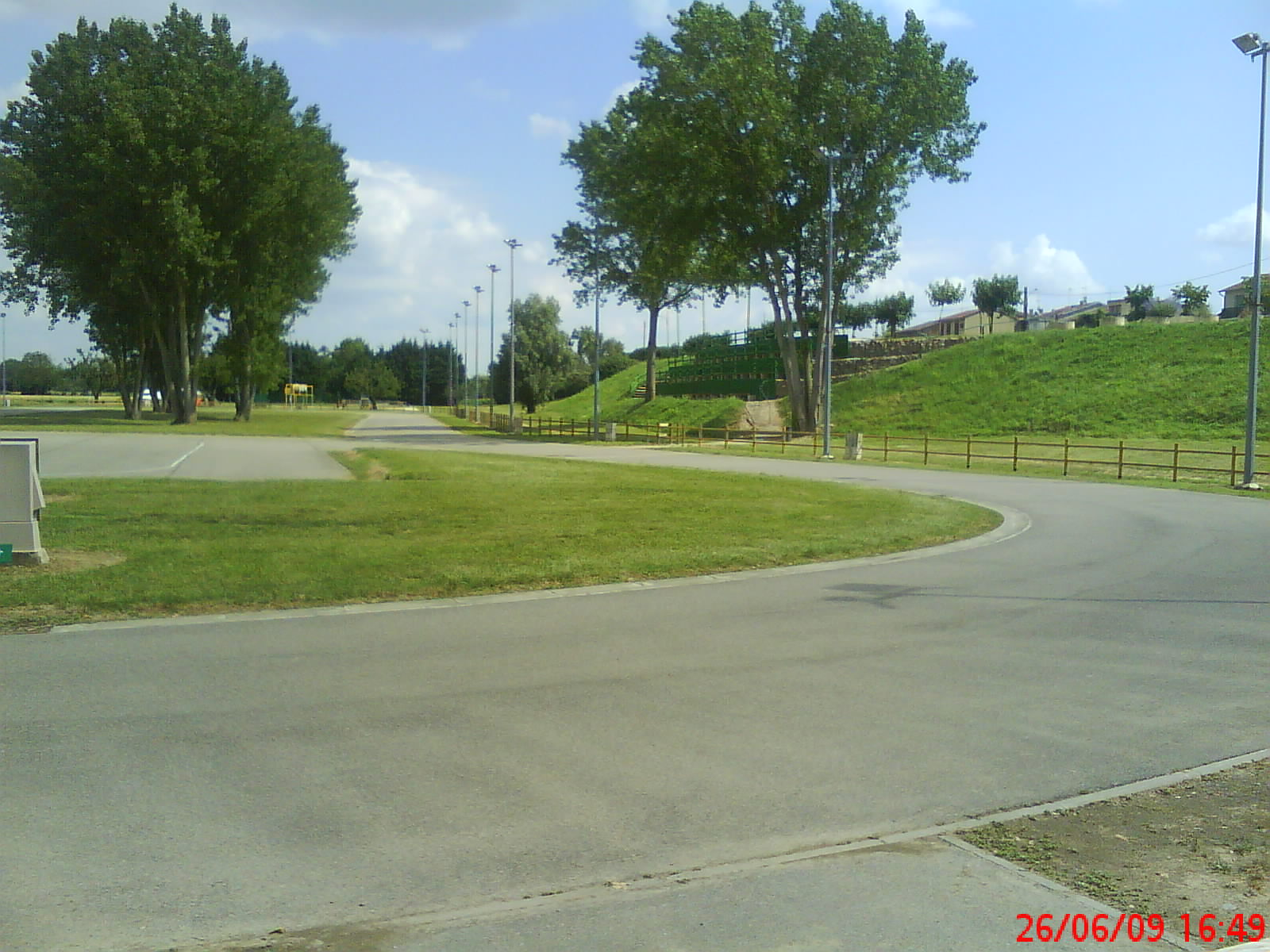 Grenade (Haute-Garonne, Midi-Pyrénées, France) : Piste de roller.